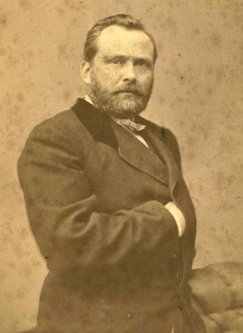 Højskoleforstander for Testrup højskole Jens Nørregård (1866-1908)